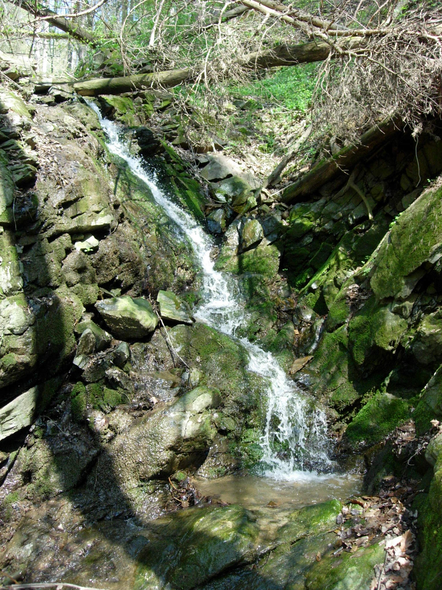 Horní vodopád - dolní úsek. První vodopád.